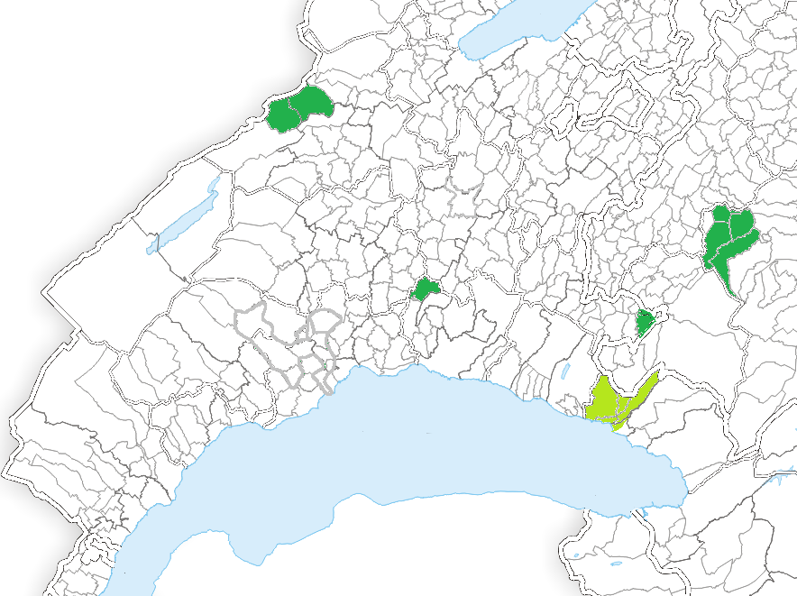 Carte anachronique des possessions de la famille Champion. Le vert clair indique que les droits des Champion sont partiels.